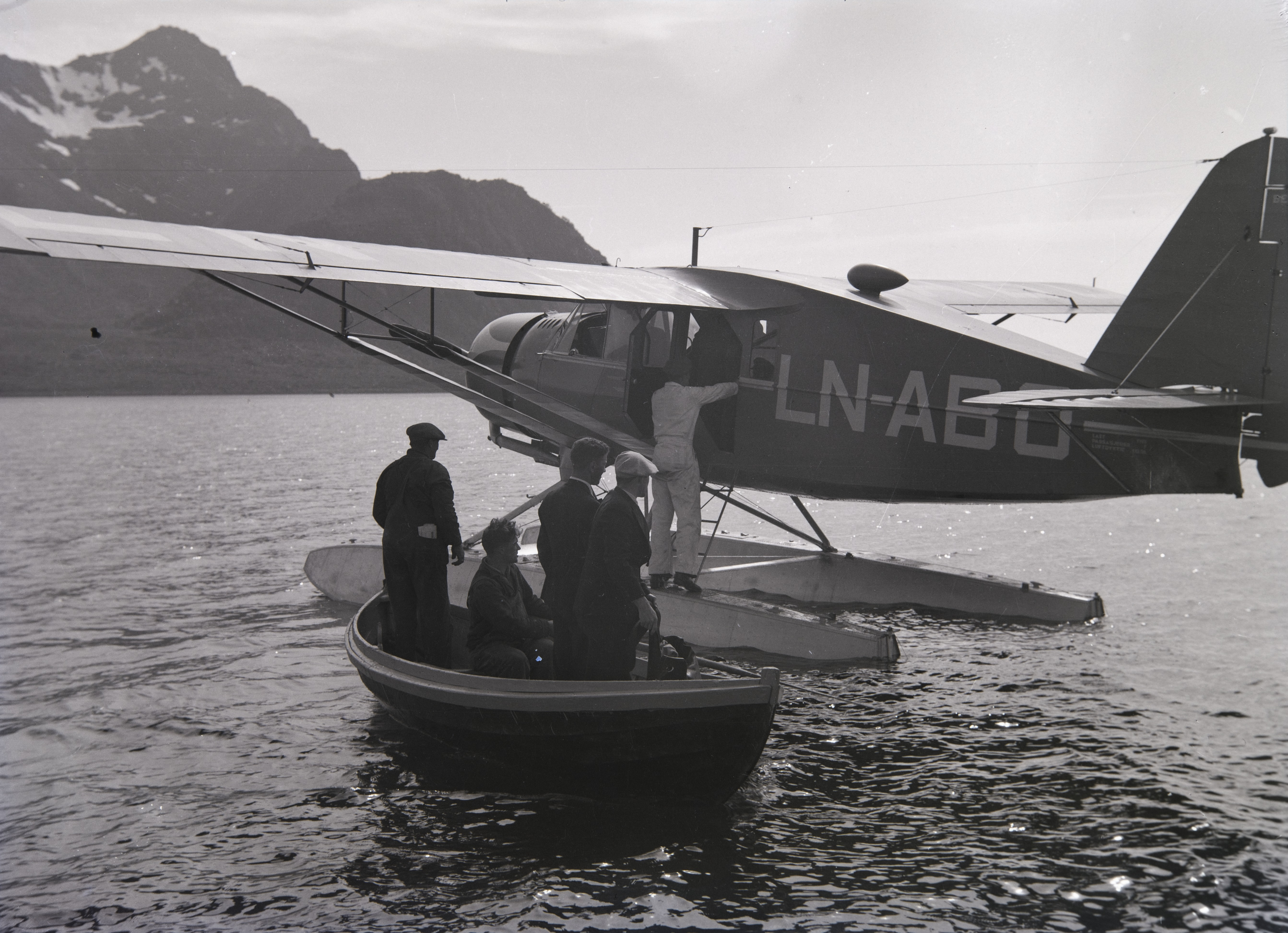 Bildet er hentet fra Nordlandsmuseet bildesamling etter Kanstad. Motivbeskrivelse: Sjøfly LN ABO (Bellancha Senior Pacemaker) Nøkkelord: Topografi og geologi Båter og farkoster, små Luftfartøyer